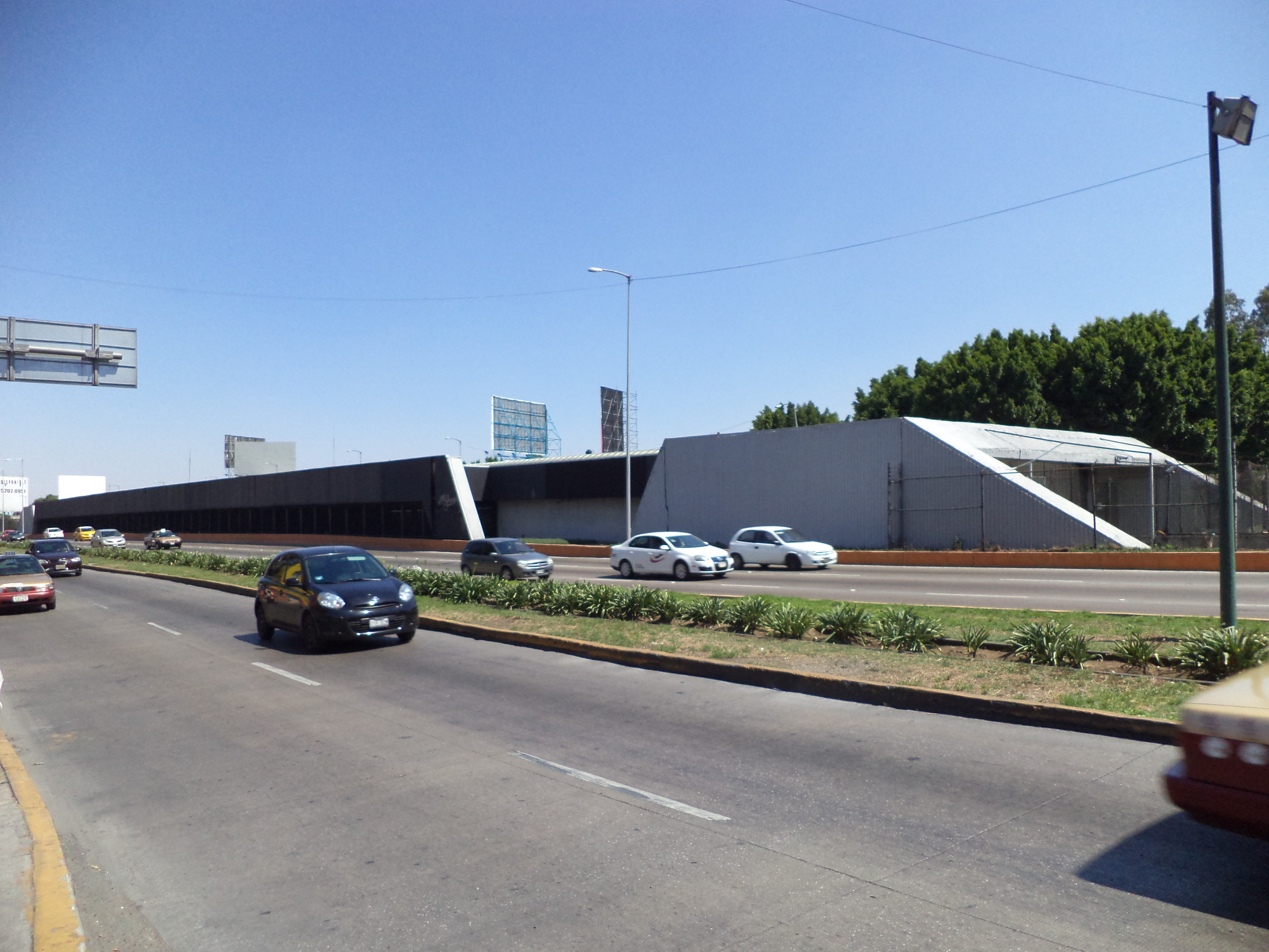 estacion consulado